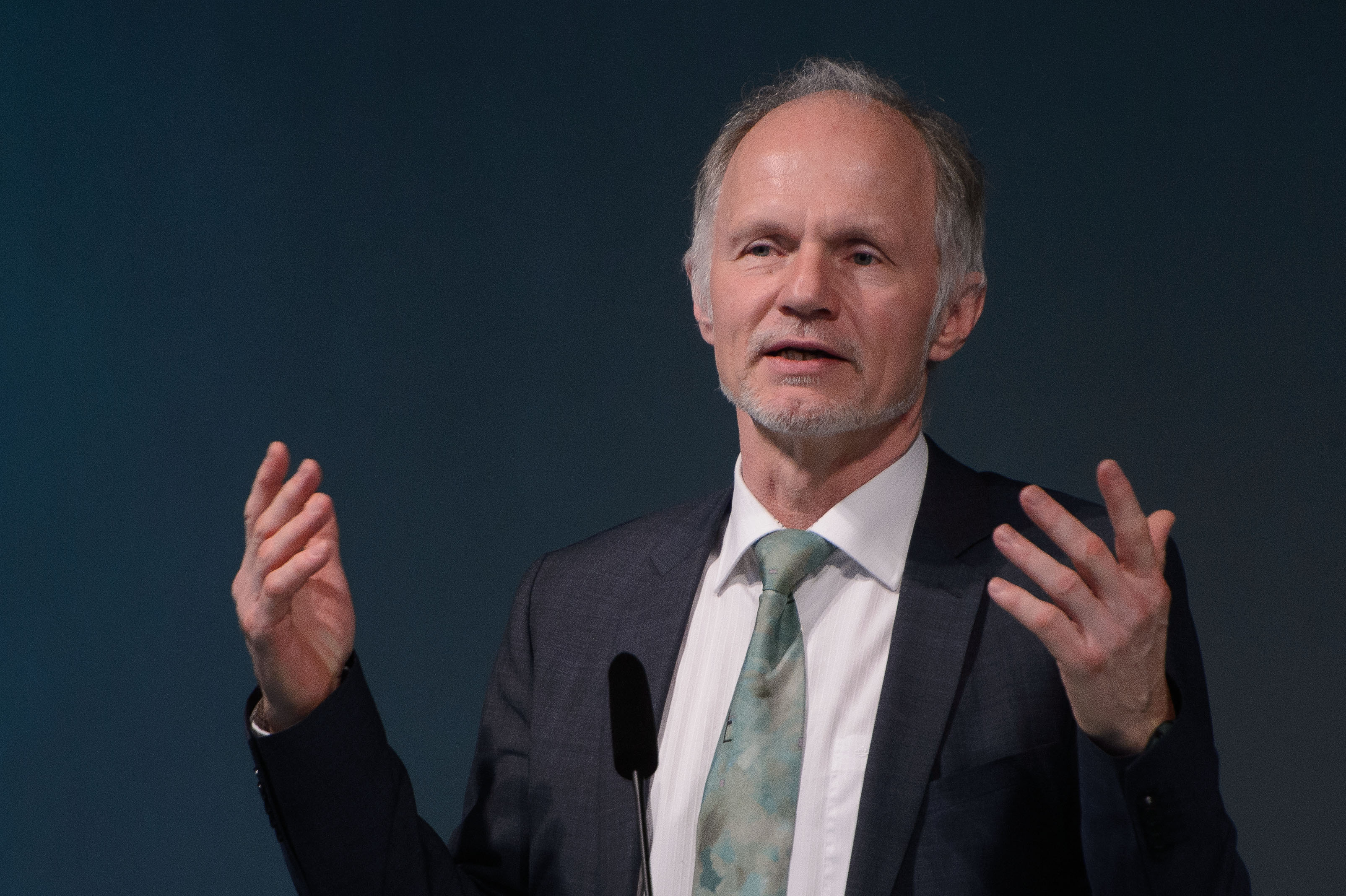 Rainer Baake (Staatssekretär für Energie im Bundesministerium für Wirtschaft und Energie, 2014–2018)